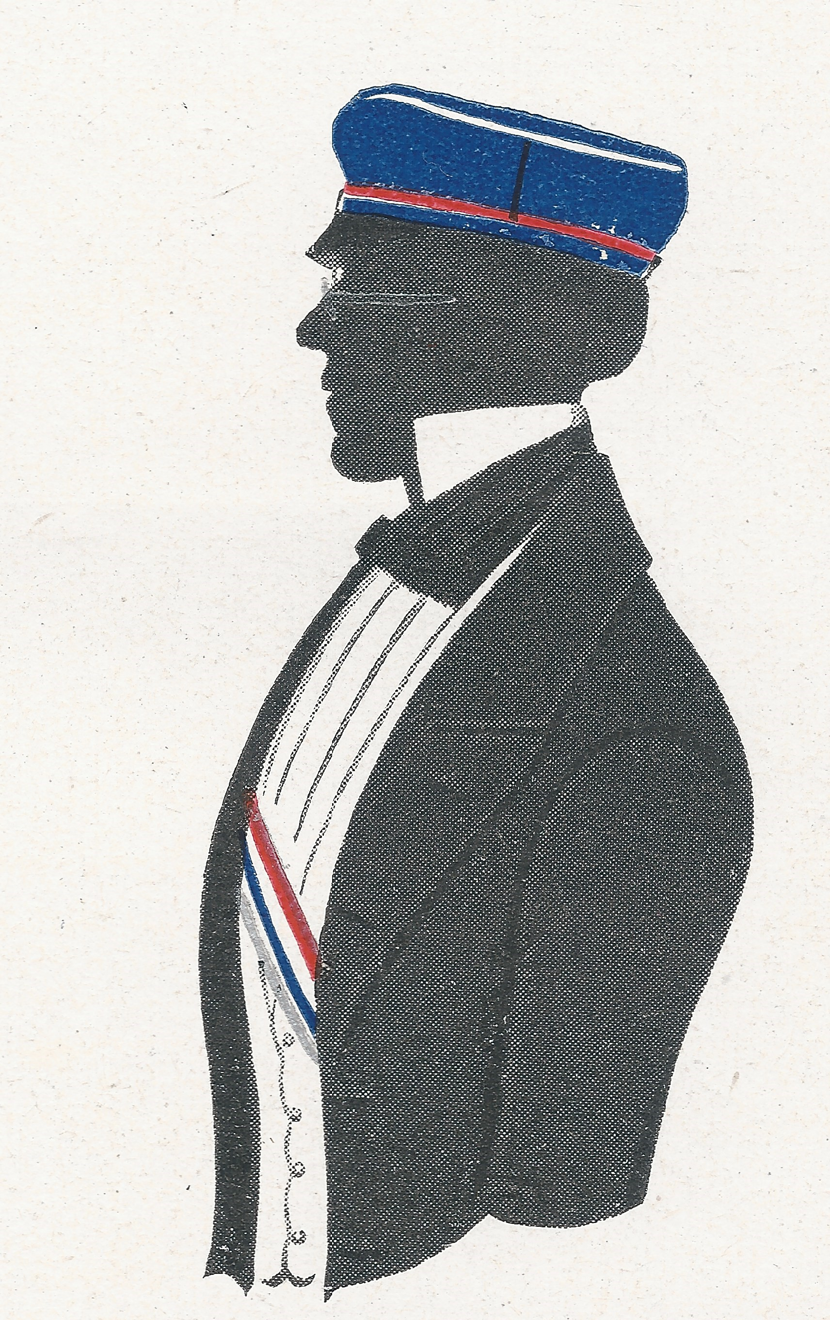 Porträtfotografie von Hugo Holstein.